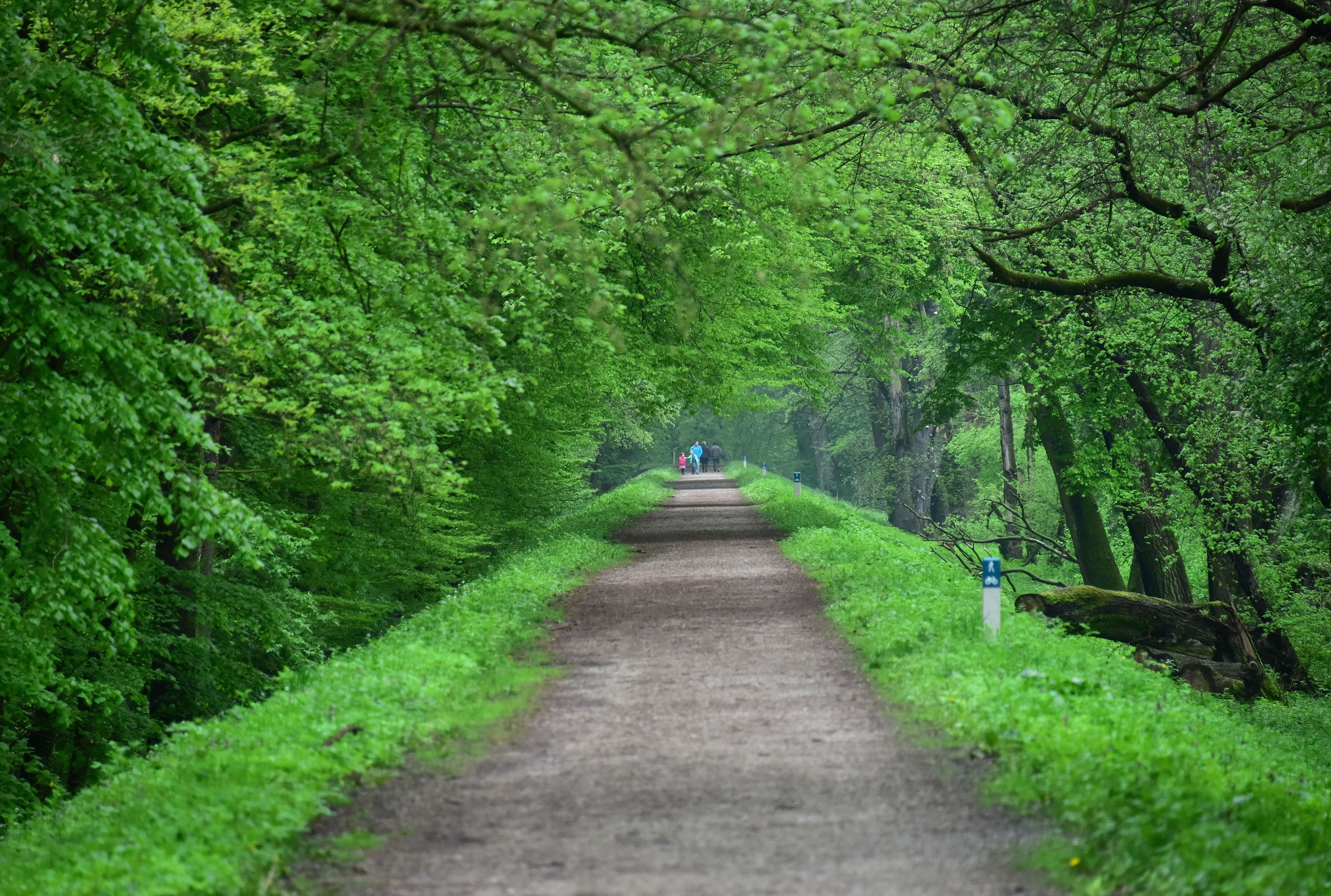 Las Młociny (park Młociński) w Warszawie